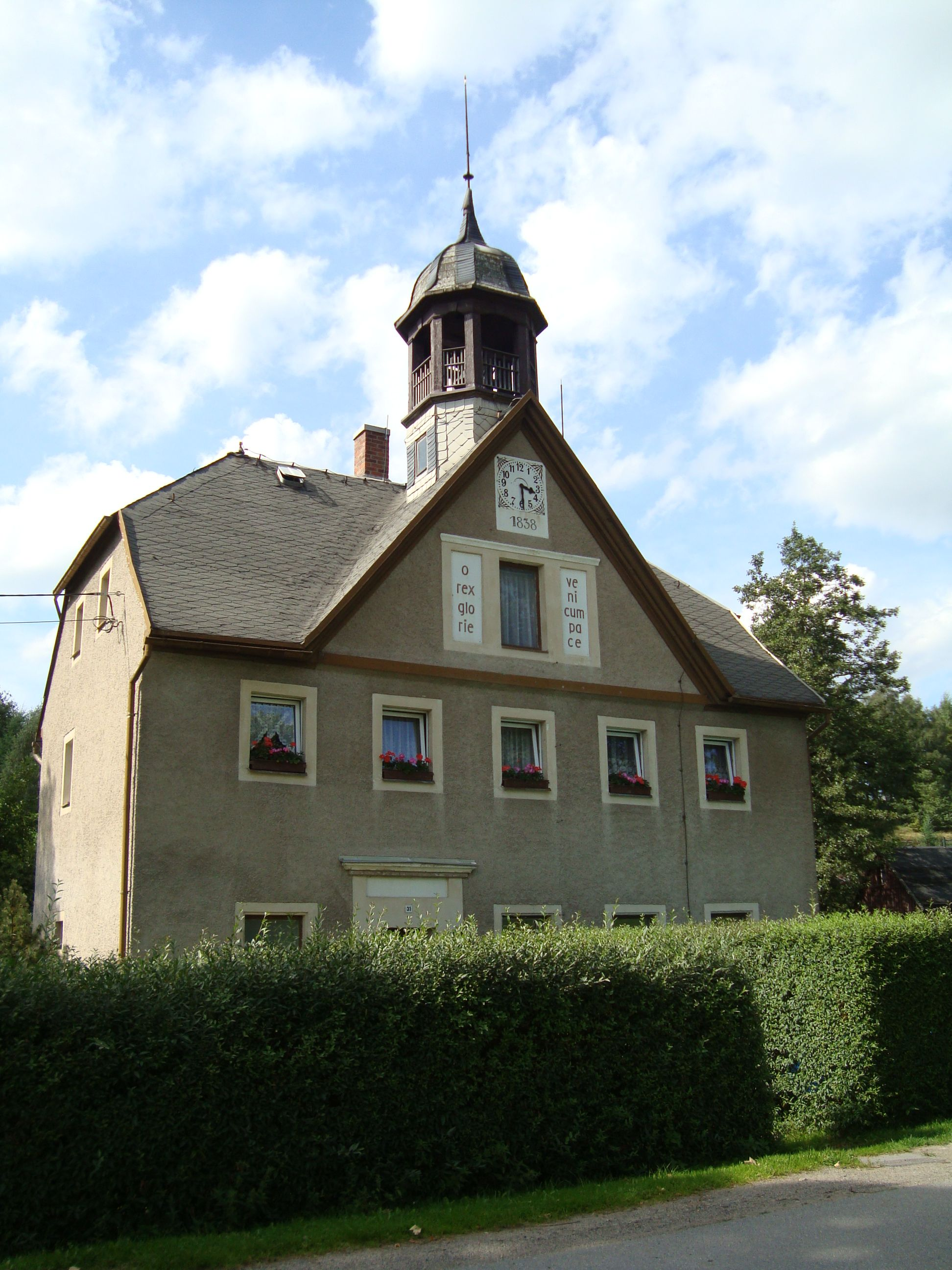 Die 1838 errichtete Nebenschule im Unterdorf von Pfaffroda OT Dörnthal im Erzgebirge